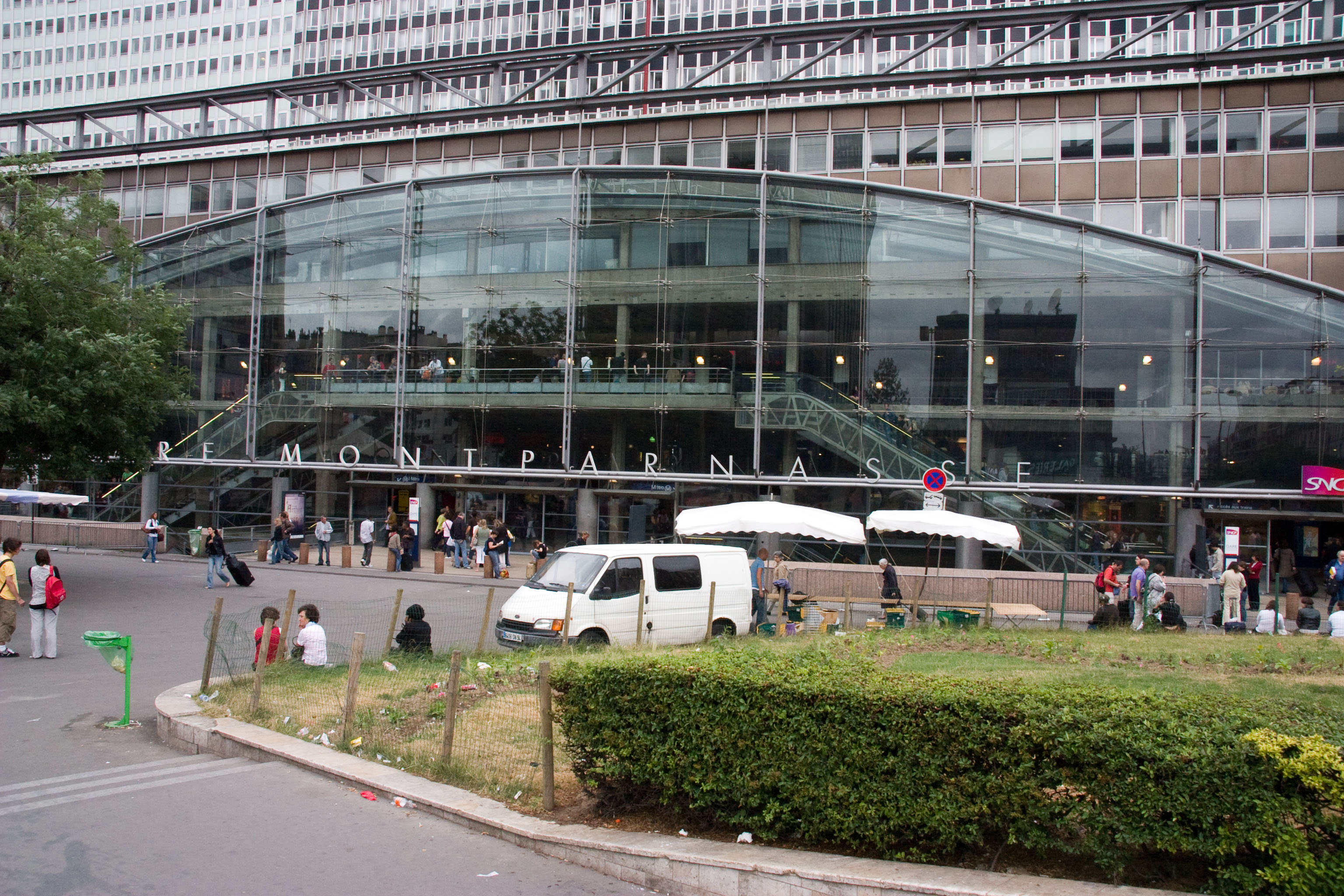 Gare de Paris-Montparnasse, Paris, France